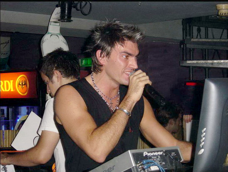 Jockey Disc italian membru al grupului Eiffel 65